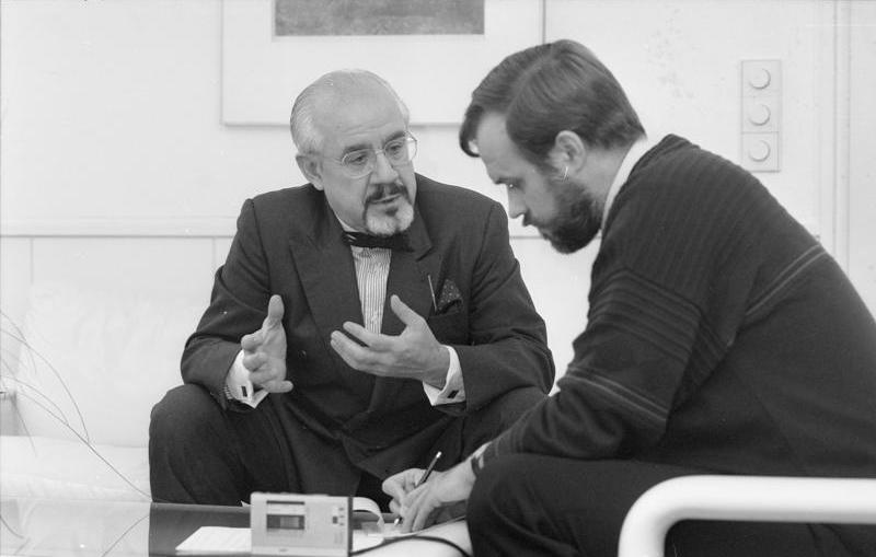 Bonn, 15. Januar 1990 Der Chef des Presse- und Informationsamtes der Bundesregierung, Bundesminister Hans Klein, gab Herrn Jürgen Liminski vom "Deutschland-Magazin" ein Interview.